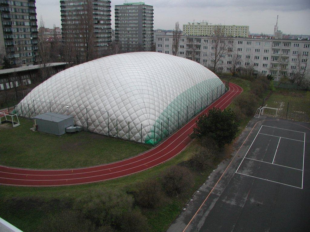 Sportovní hala ZŠ Hostýnská